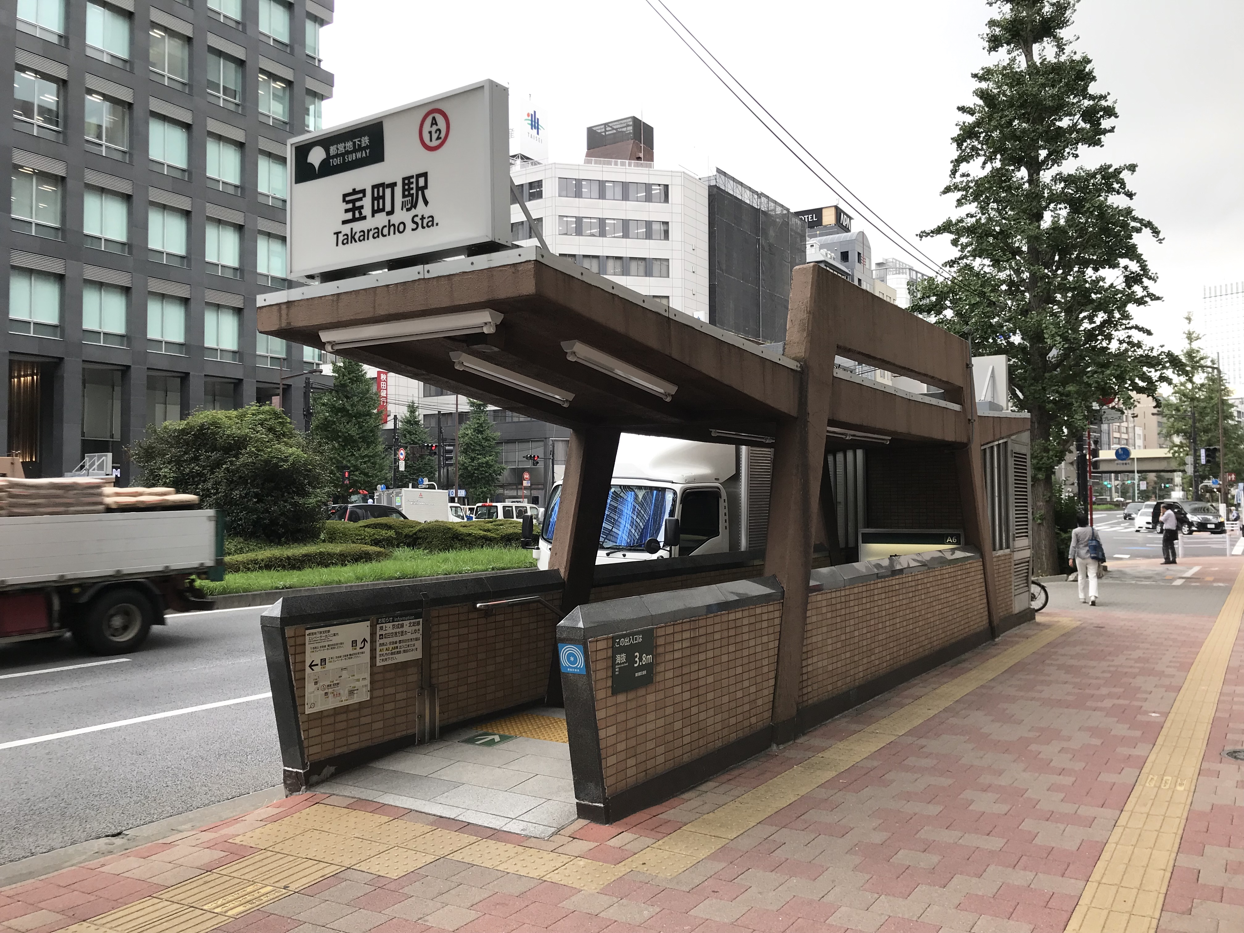 都営地下鉄浅草線宝町駅A1番出入口